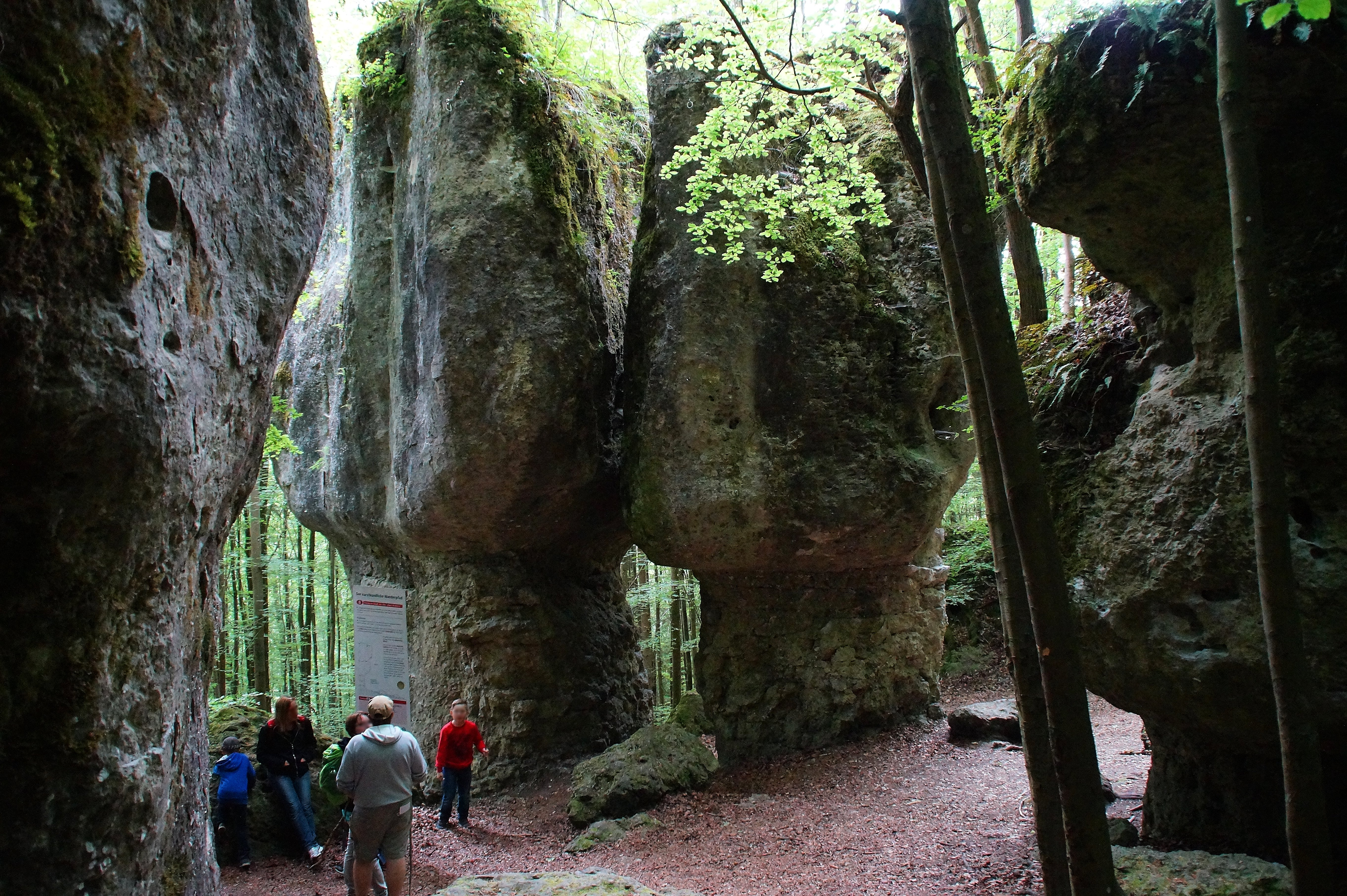 Steinerne Stadt bei Krottensee, Neuhaus a.d. Pegnitz; Karstkundlicher Wanderpfad